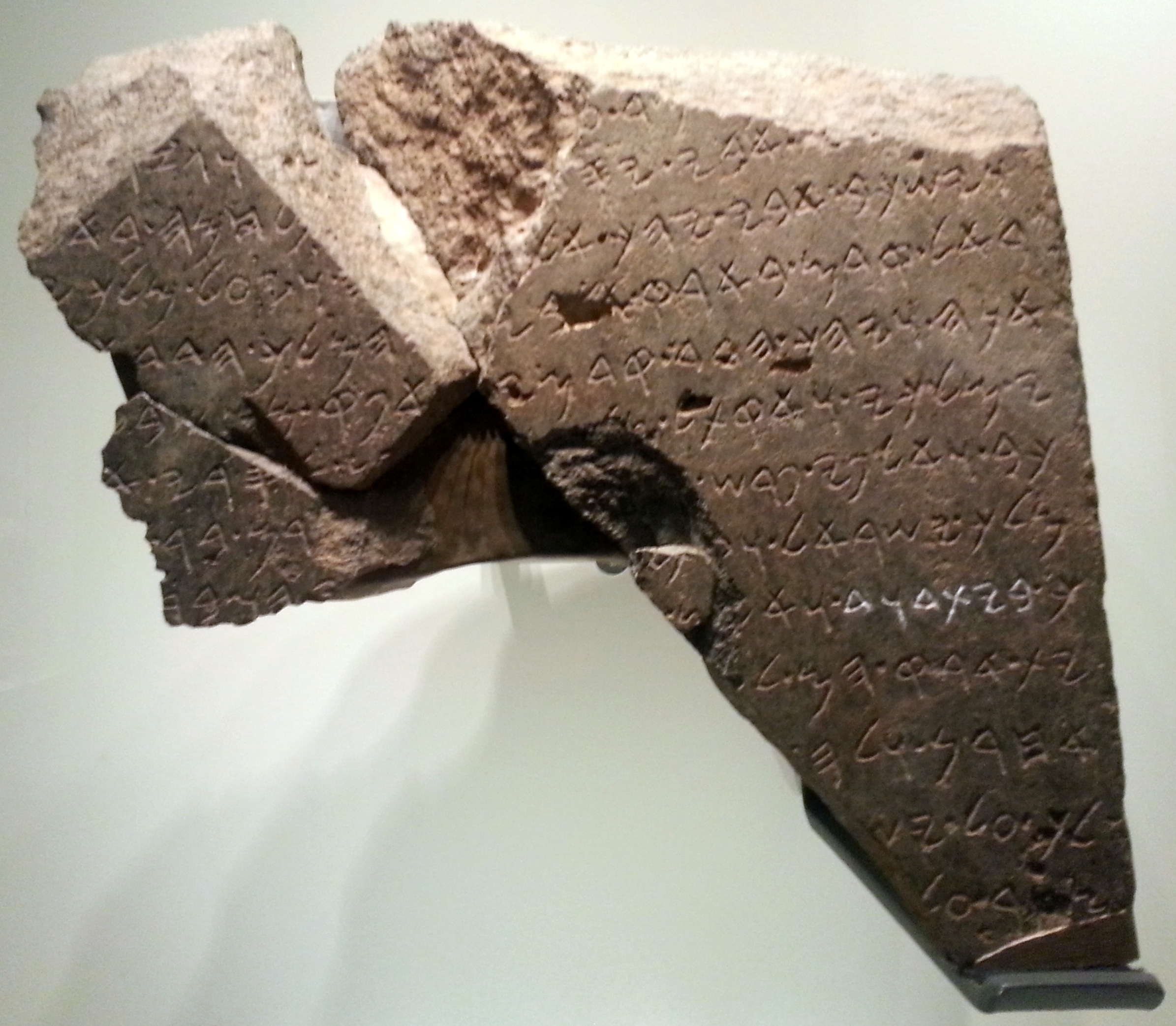 כתובת תל דן עם הפסוק: "וימשחו שם את דוד למלך"; פריט בתצוגת מוזאון ישראל בירושלים